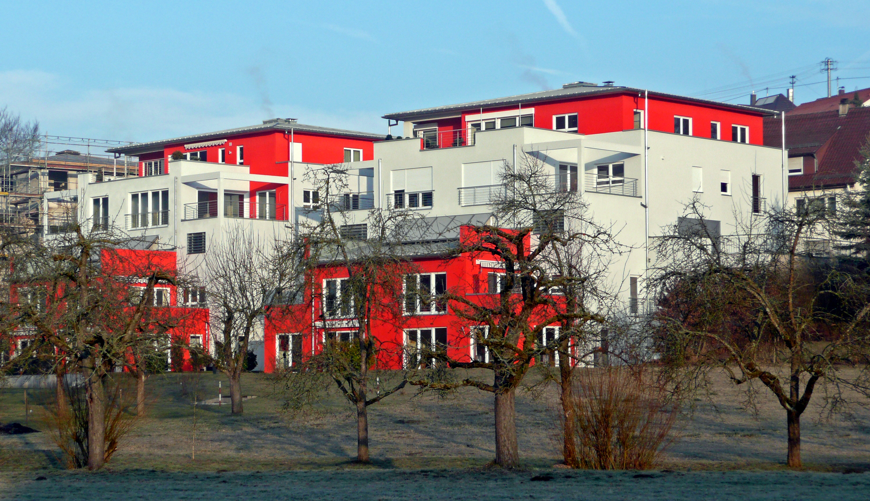 Aidterrassen